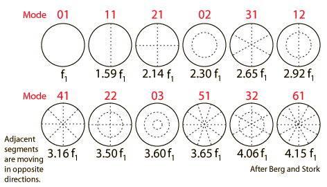 รูป แสดงการสั่นที่ความถี่ธรรมชาติของแผ่นบางรูปวงกลม